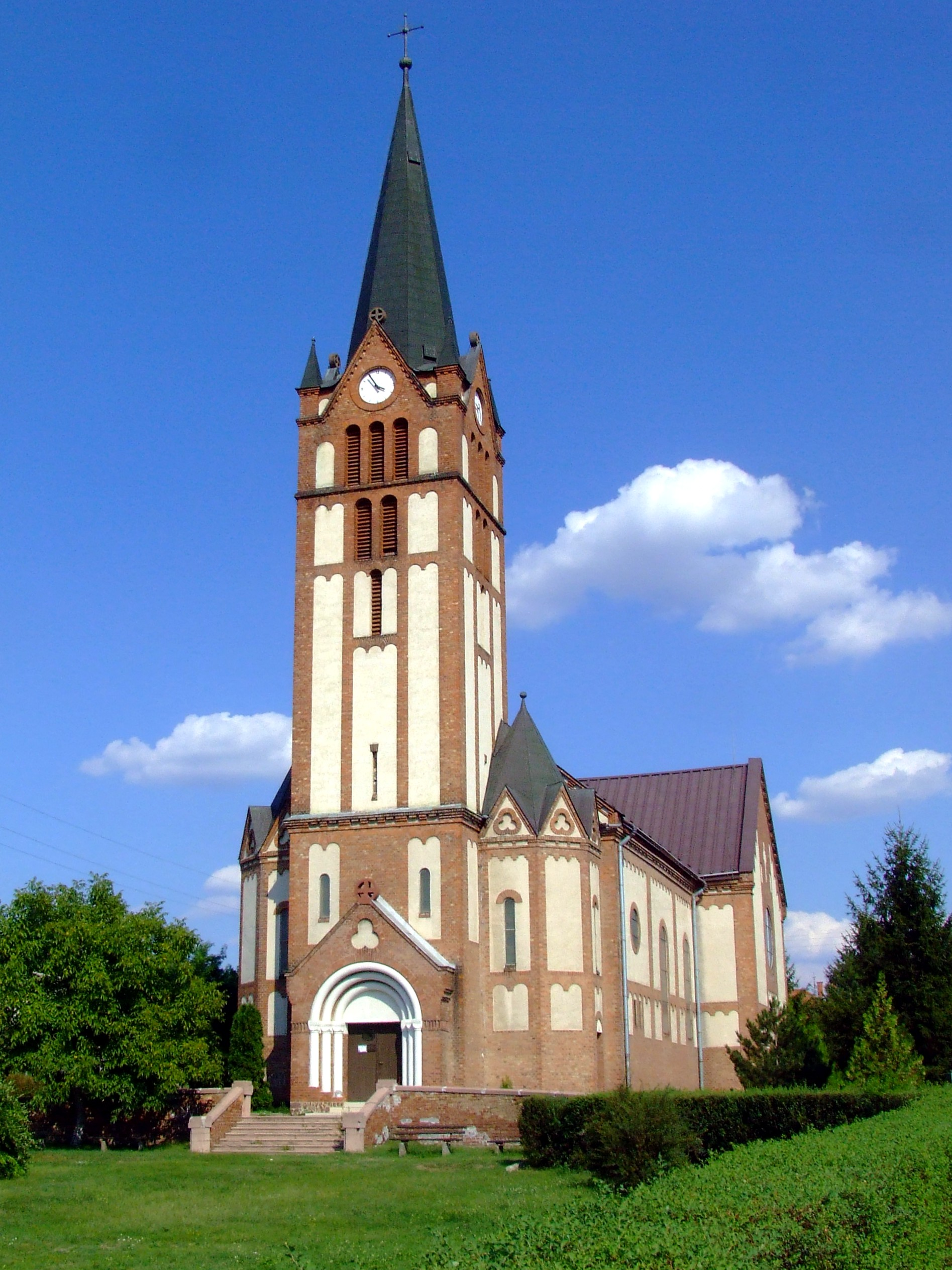 A Szent Szíve római katolikus templom Baján